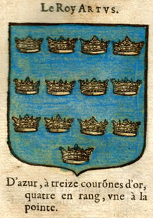 Arthur blason